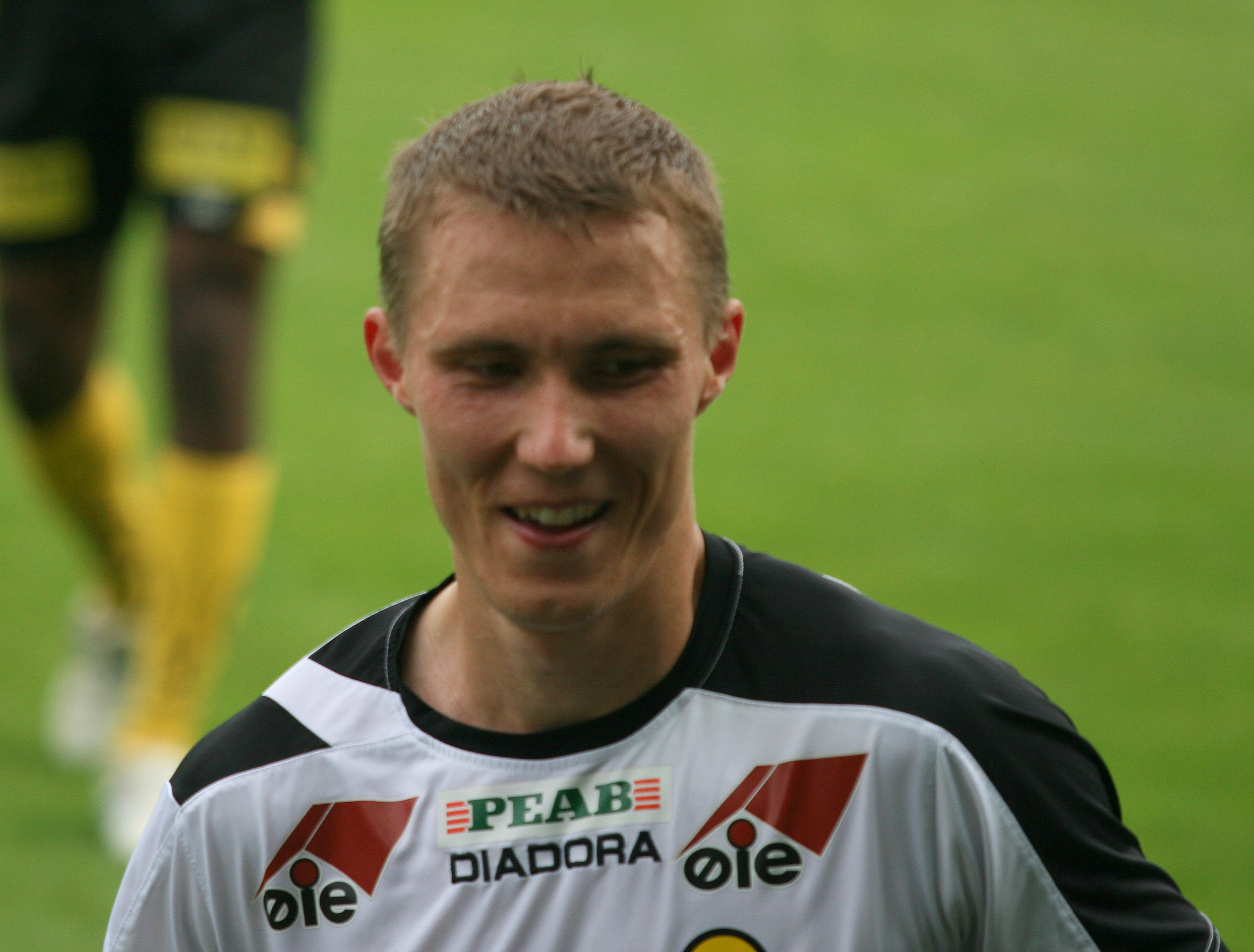 Otto Fredrikson